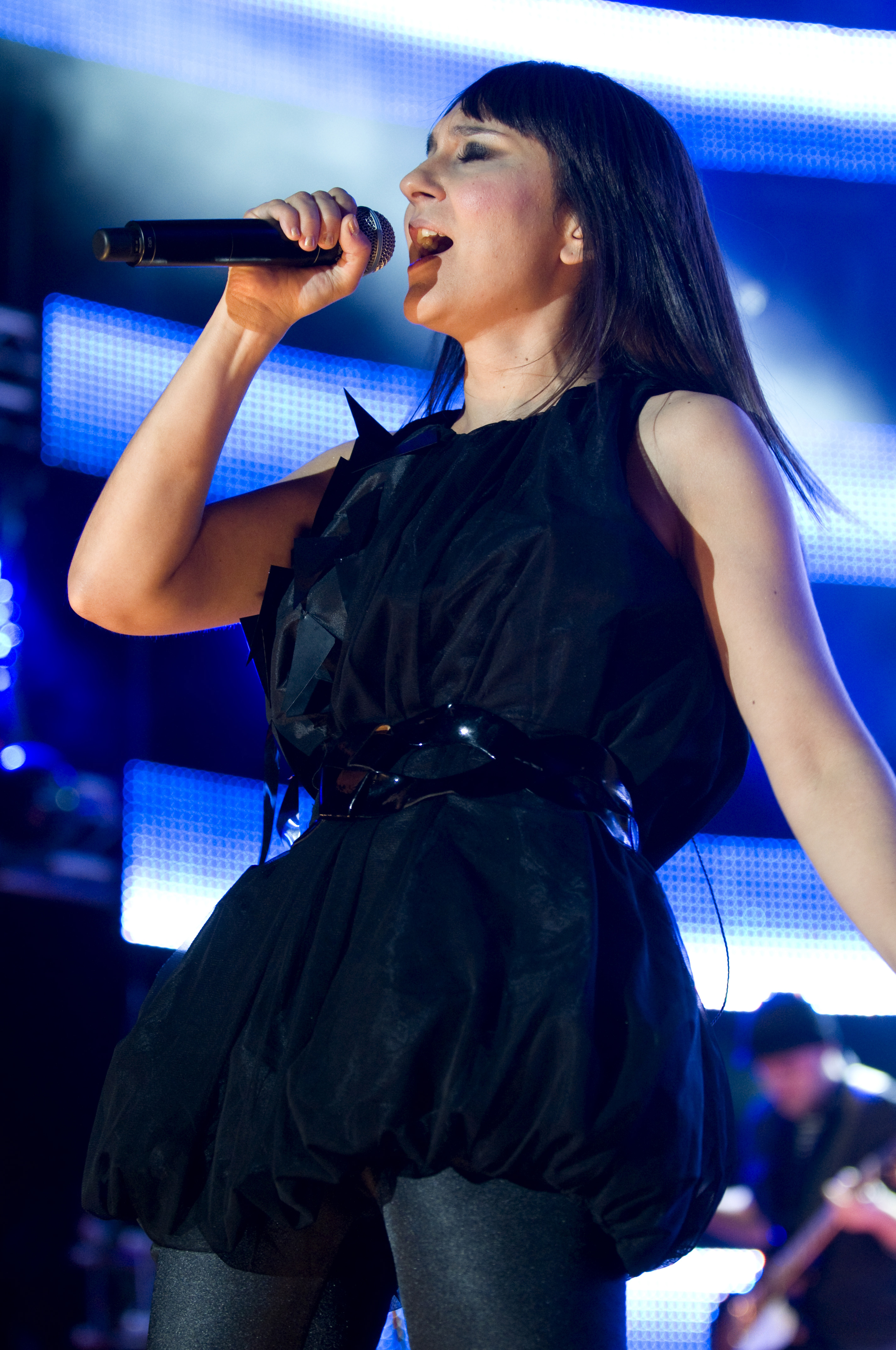 Amaral